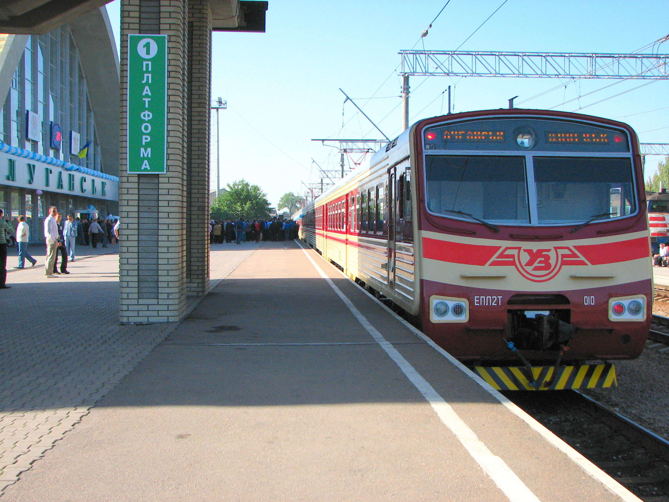 Elektrichka EPL2T-010 (Luhansk-Donetsk) at Luhansk railway station.